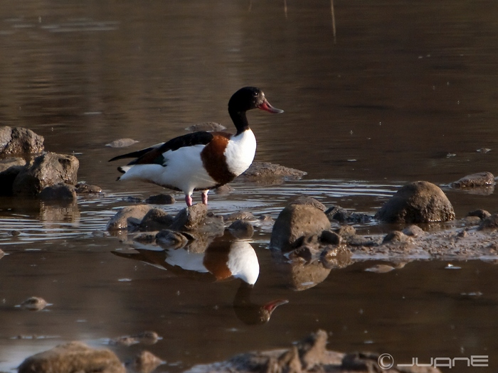 Tarro blanco, (Todorna todorna.)